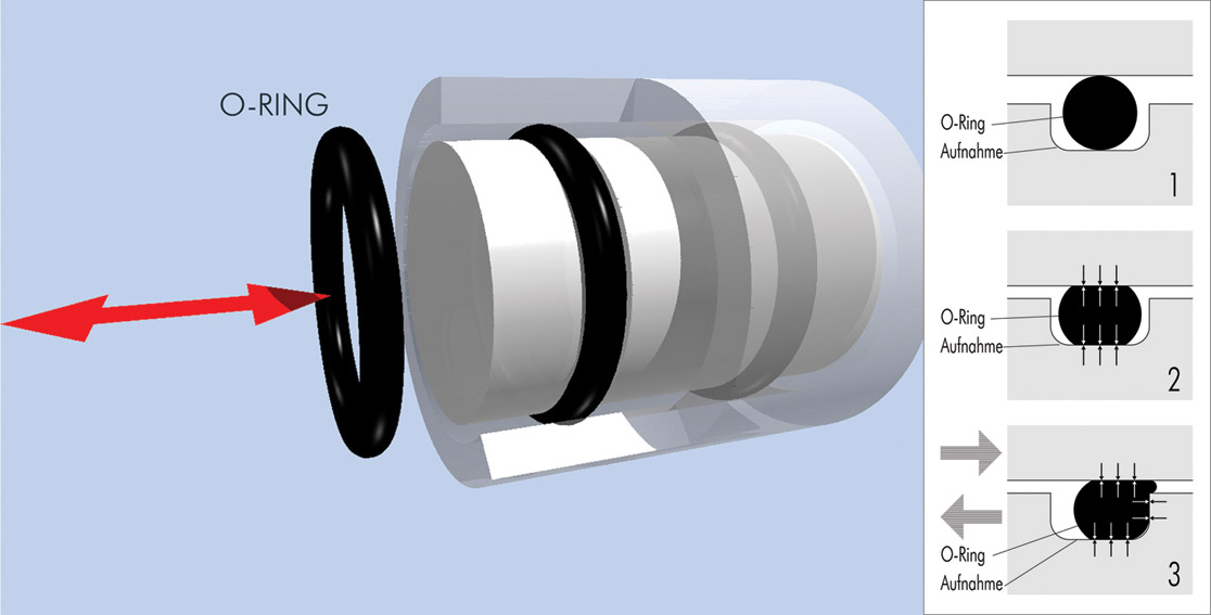 CAD-Skizze zu O-Ring (Dichtung)